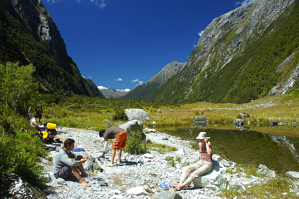 Wanderer am Milford Track